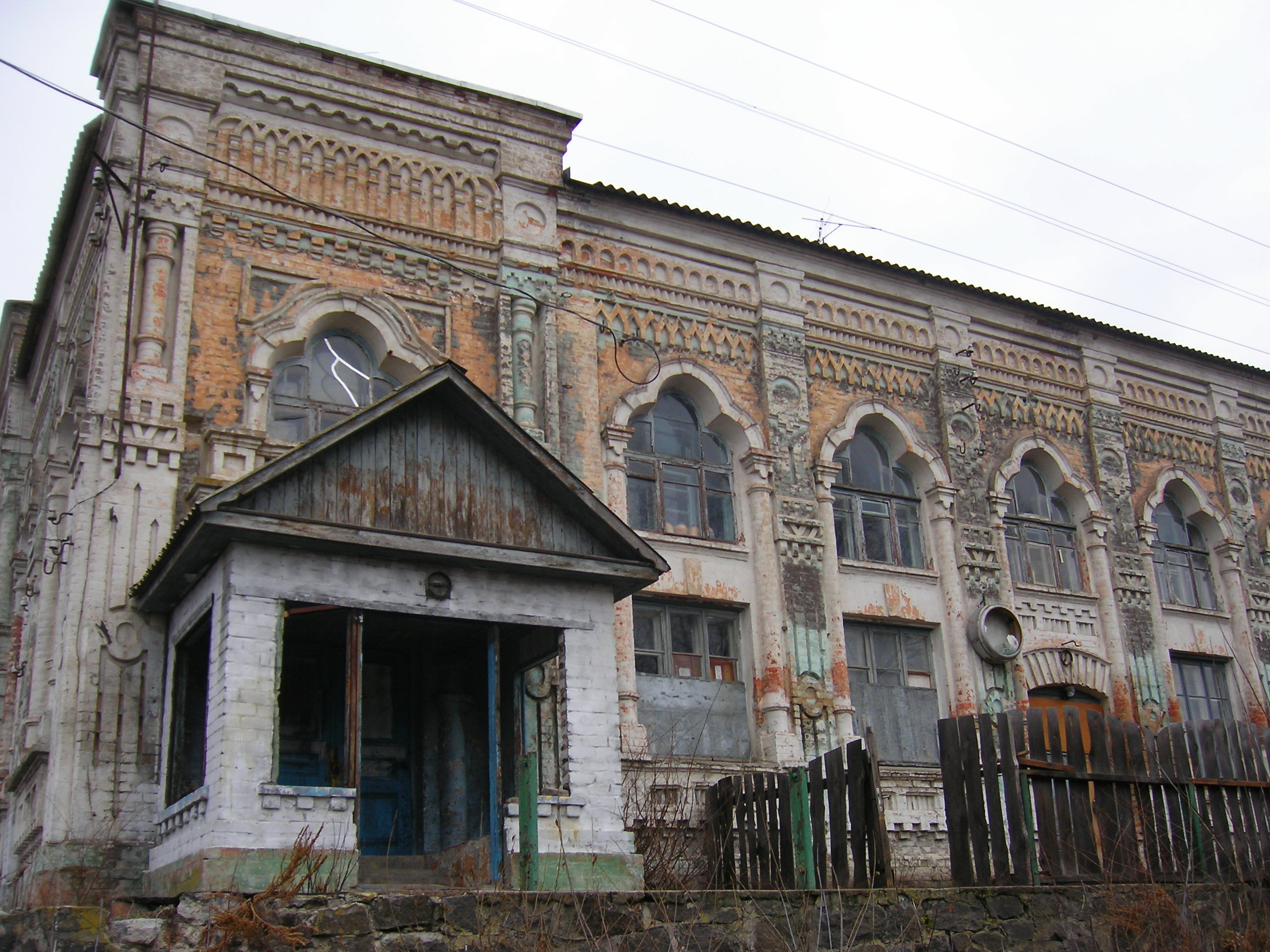 Залізнична станція "Васильків ІІ", колишня синагога